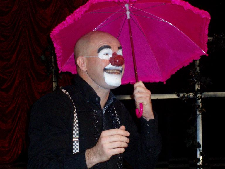 Lasse Beischer som clown 2006.